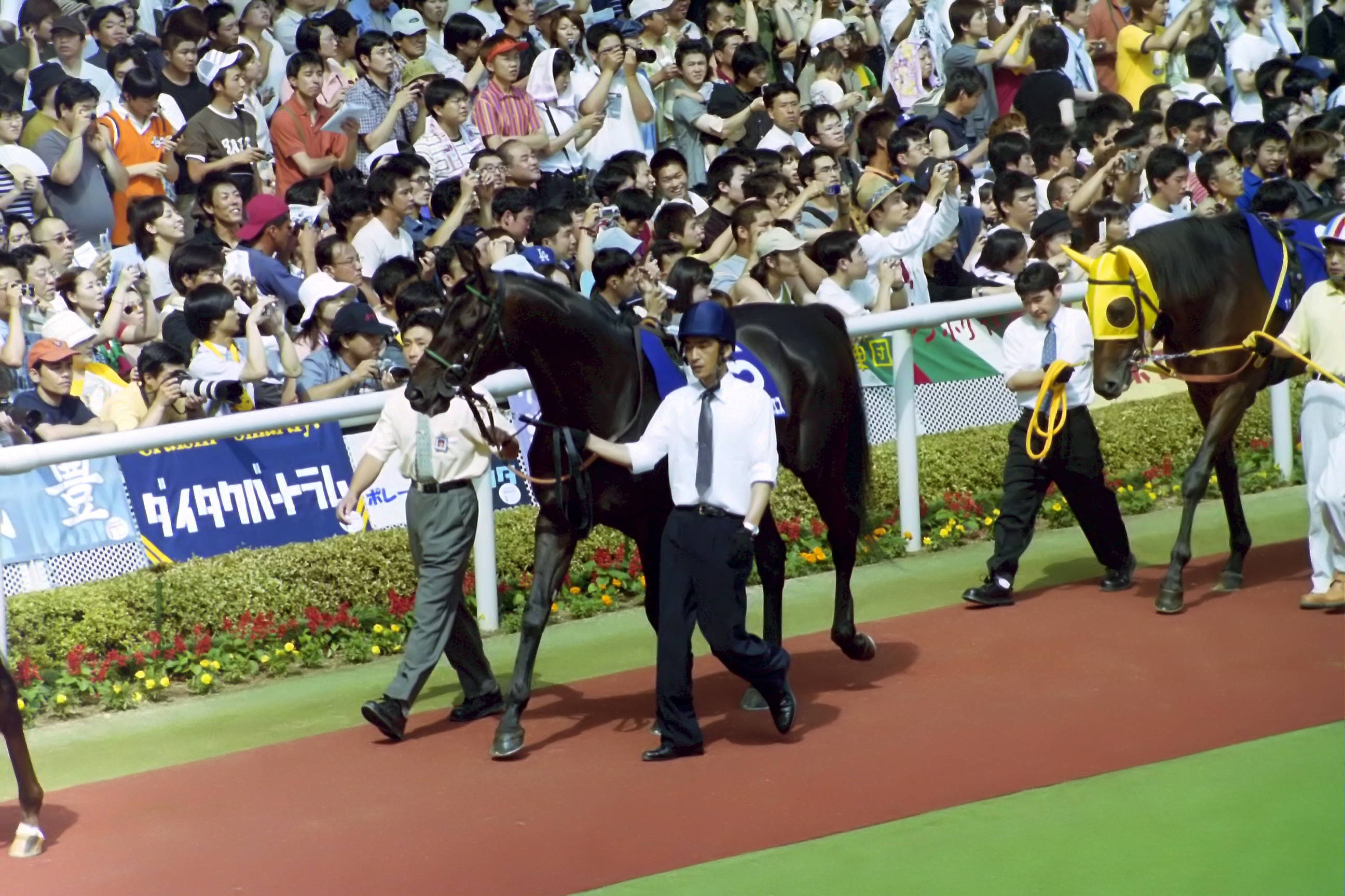 シンボリクリスエス 2003年宝塚記念